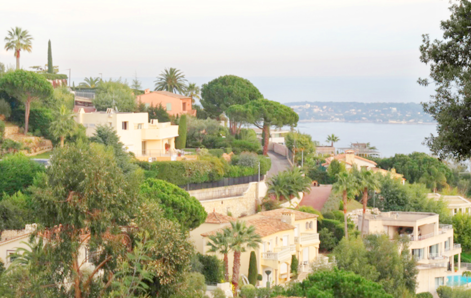 Cannes, quartier de la Californie, PACA, France